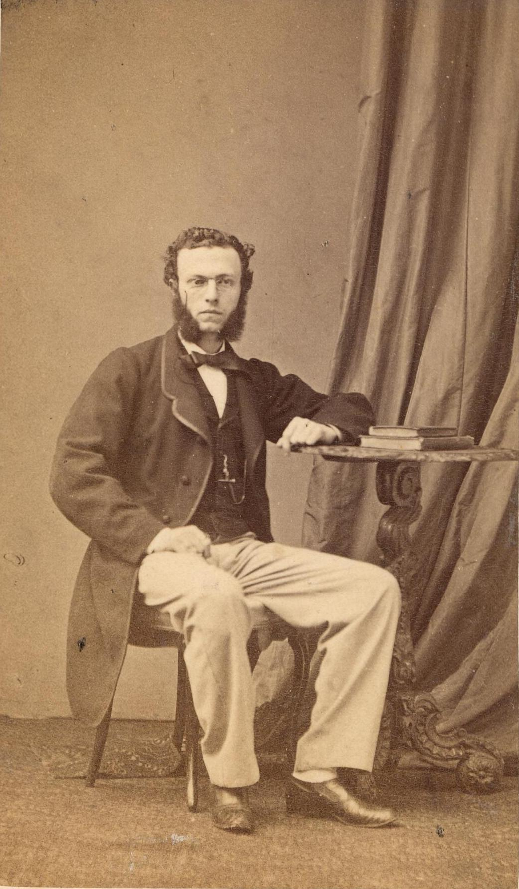 Willem Anthony Engelbrecht (1839-1921)